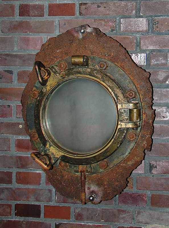 Dieses Bild zeigt ein Bullauge des Passagierschiffs „Wilhelm Gustloff“. Es wurde 1988 geborgen.